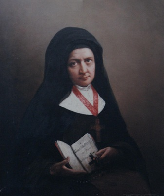 Portrait de Théodolinde Bourcin-Dubouché, Vénérable Mère Marie-Thérèse du Cœur de Jésus (1809-1863)